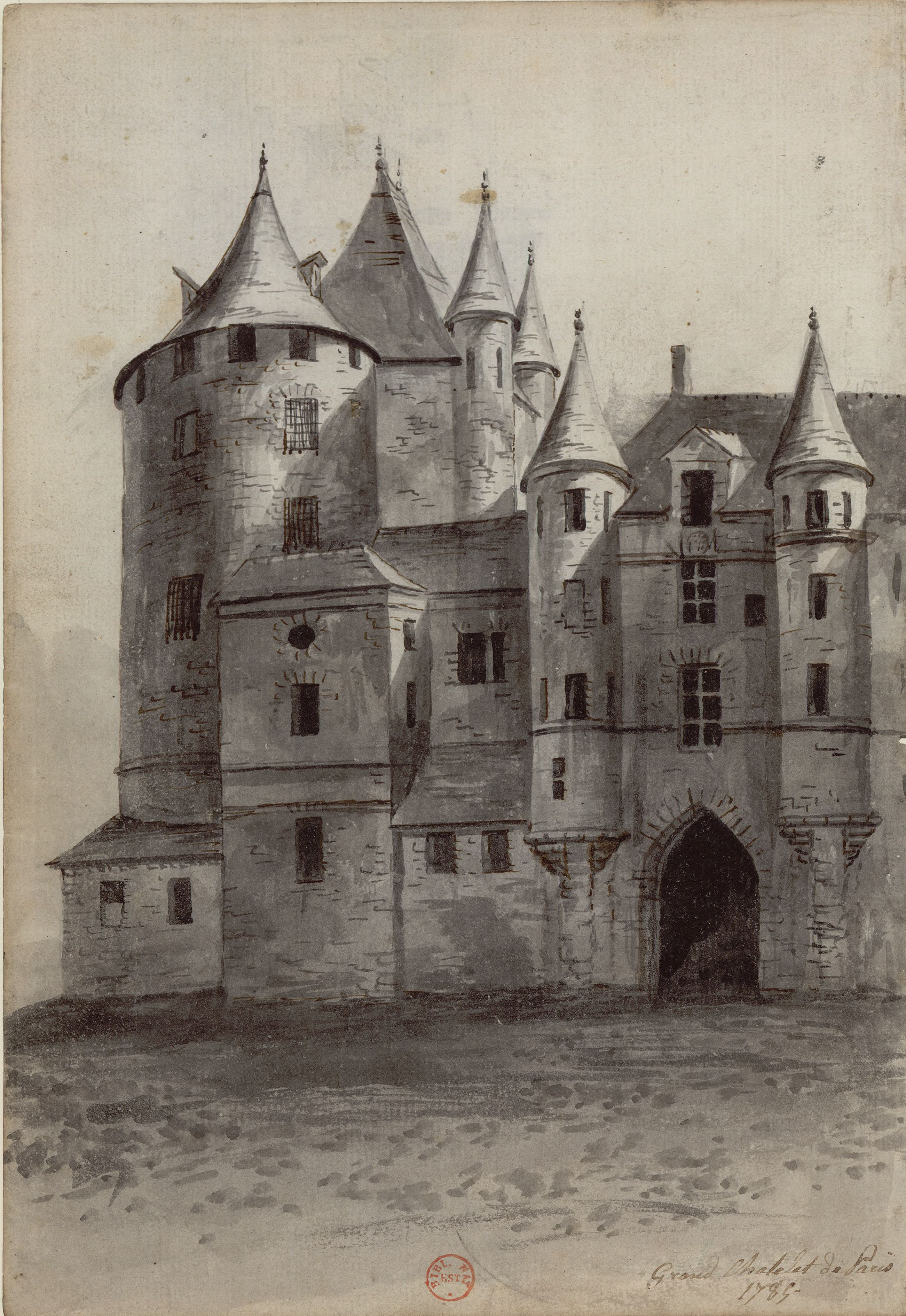 Grand Châtelet de Paris France